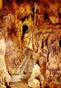 Resavska cave in Eastern Serbia